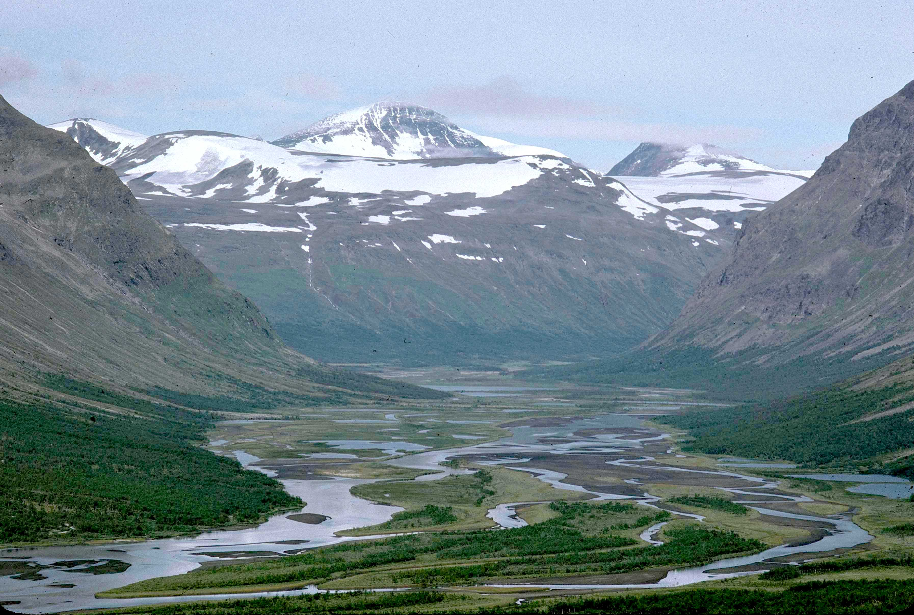 Rapaselet i Sarek